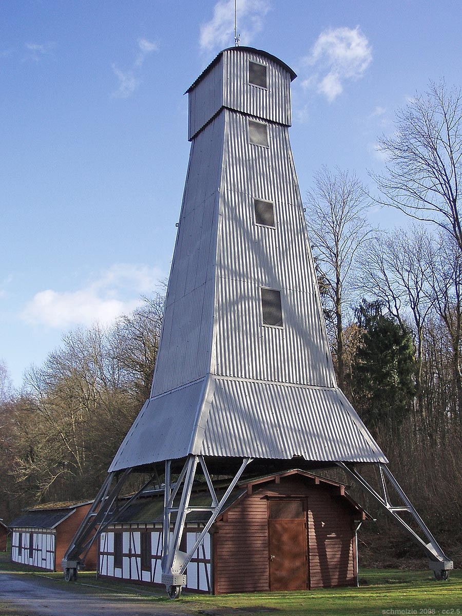 Fahrbarer Bohrturm der Saline in Bad Rappenau